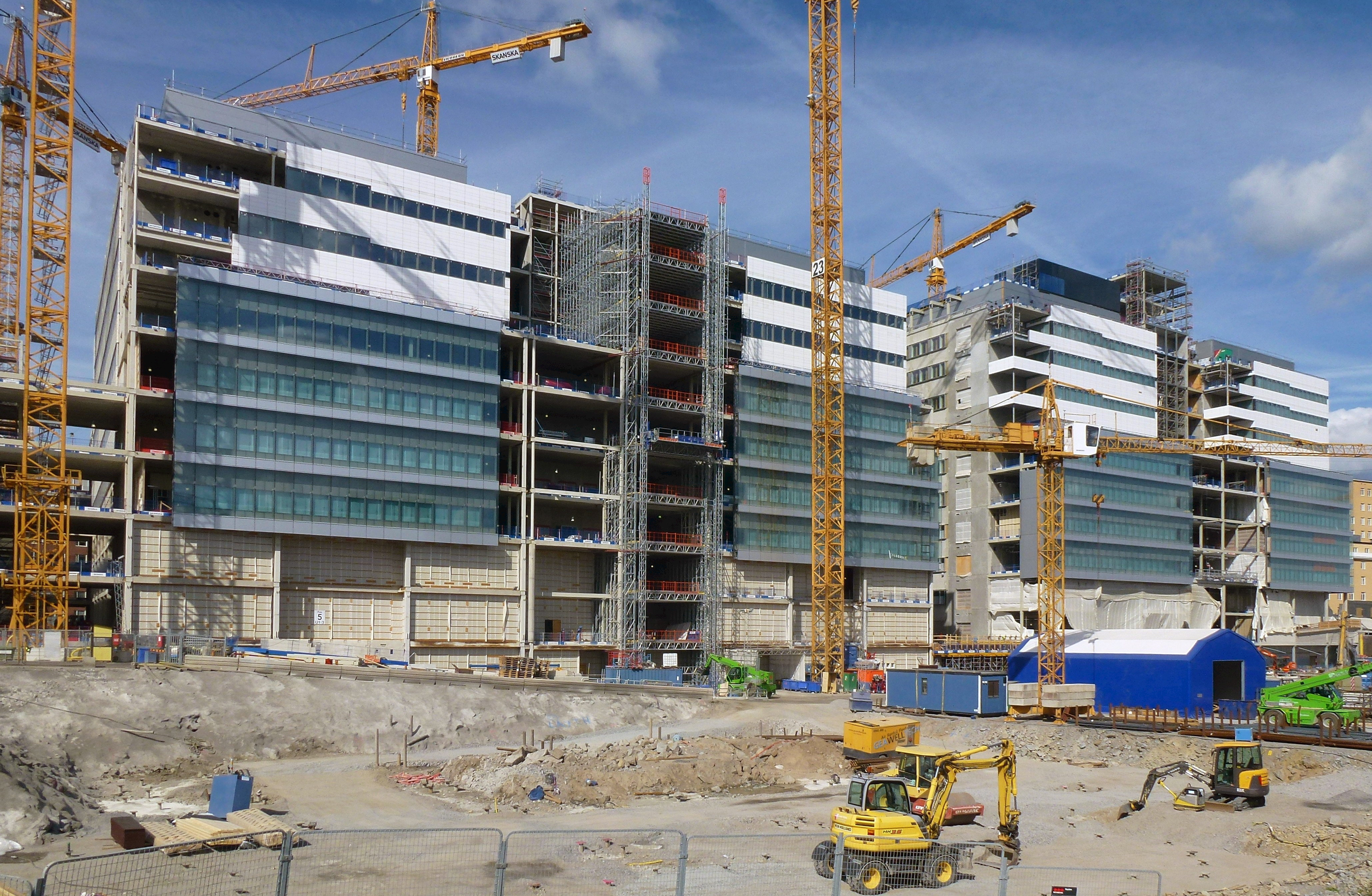 Nya Karolinska sjukhuset